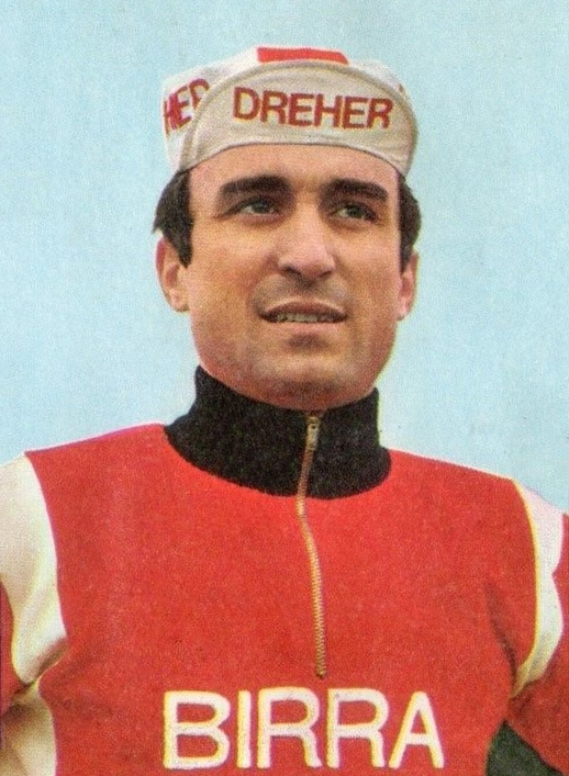 Ciclismo SPRINT '71- PANINI -Figurina n.150- TURRINI - ITALIA -Rec